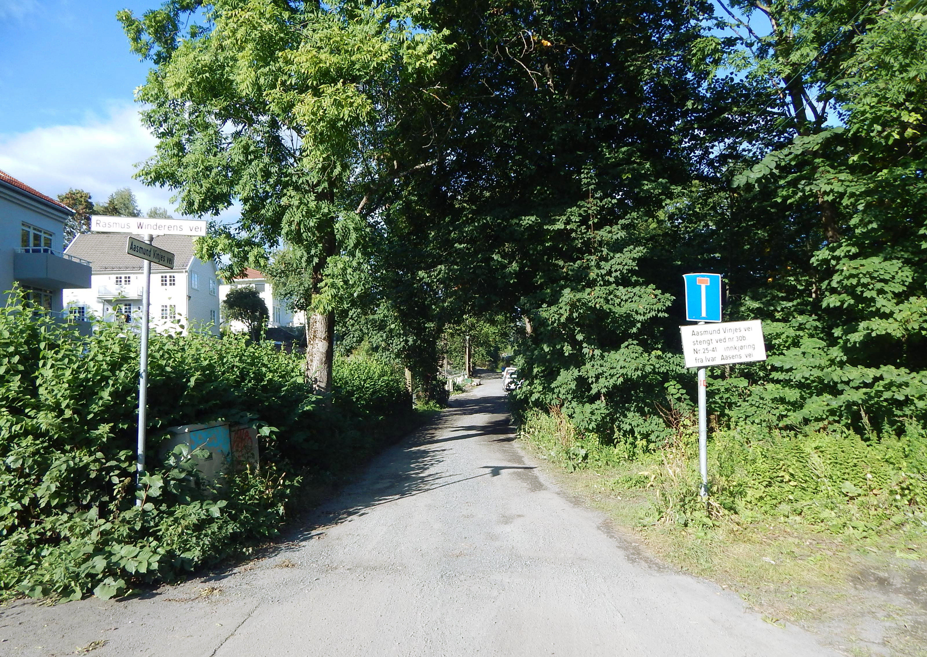 Aasmund Vinjes vei sett fra Rasmus Winderens vei